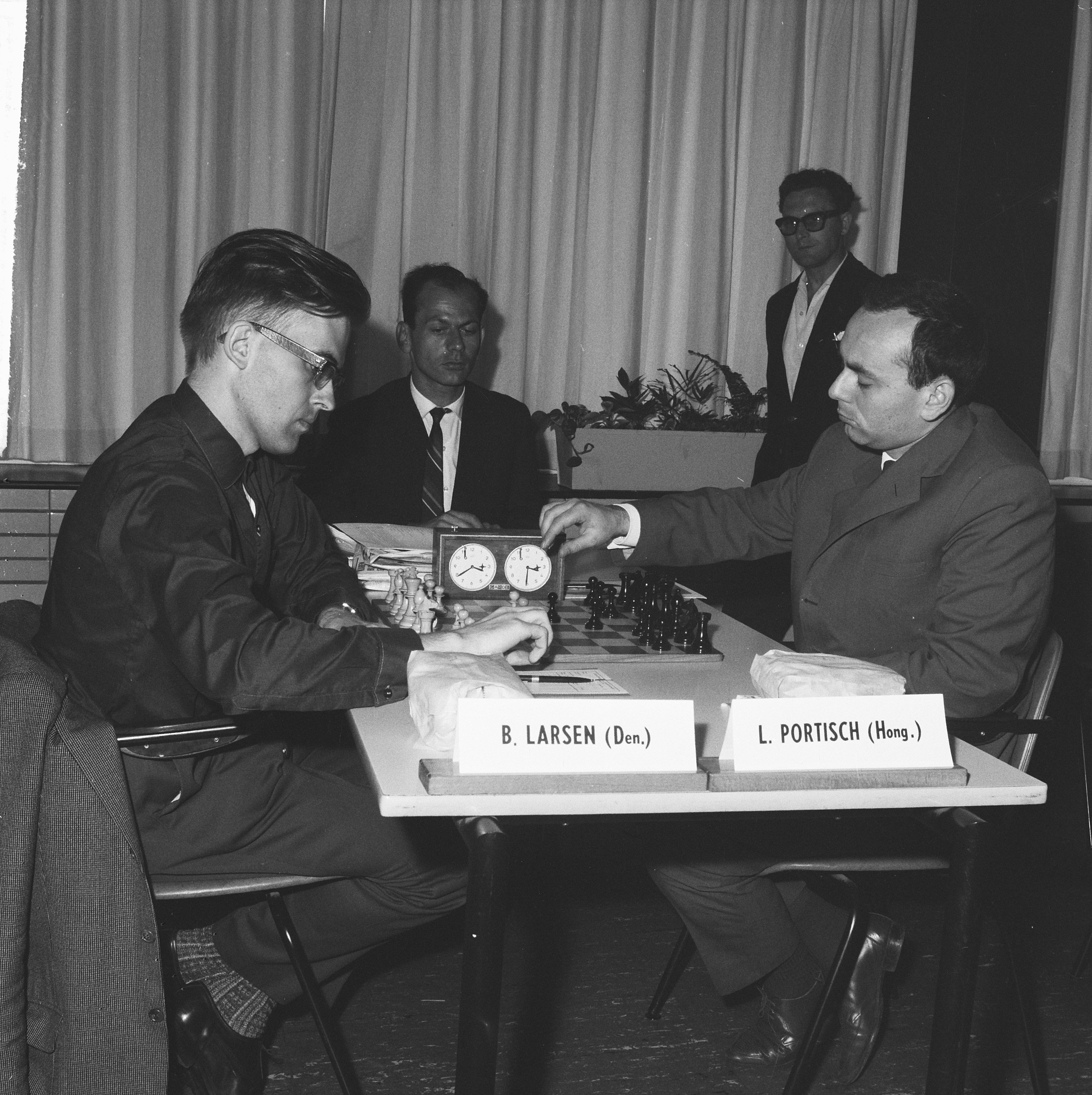 Collectie / Archief : Fotocollectie Anefo Reportage / Serie : [ onbekend ] Beschrijving : Interzone schaaktoernooi in het GAK, Larsen (Denemarken) tegen L. Portisch (Hongarije) Datum : 8 juni 1964 Trefwoorden : SCHAAKTOURNOOIEN Persoonsnaam : Portisch, Lajos Instellingsnaam : GAK Fotograaf : Broers, F.N. / Anefo Auteursrechthebbende : Nationaal Archief Materiaalsoort : Negatief (zwart/wit) Nummer archiefinventaris : bekijk toegang 2.24.01.03 Bestanddeelnummer : 916-5233